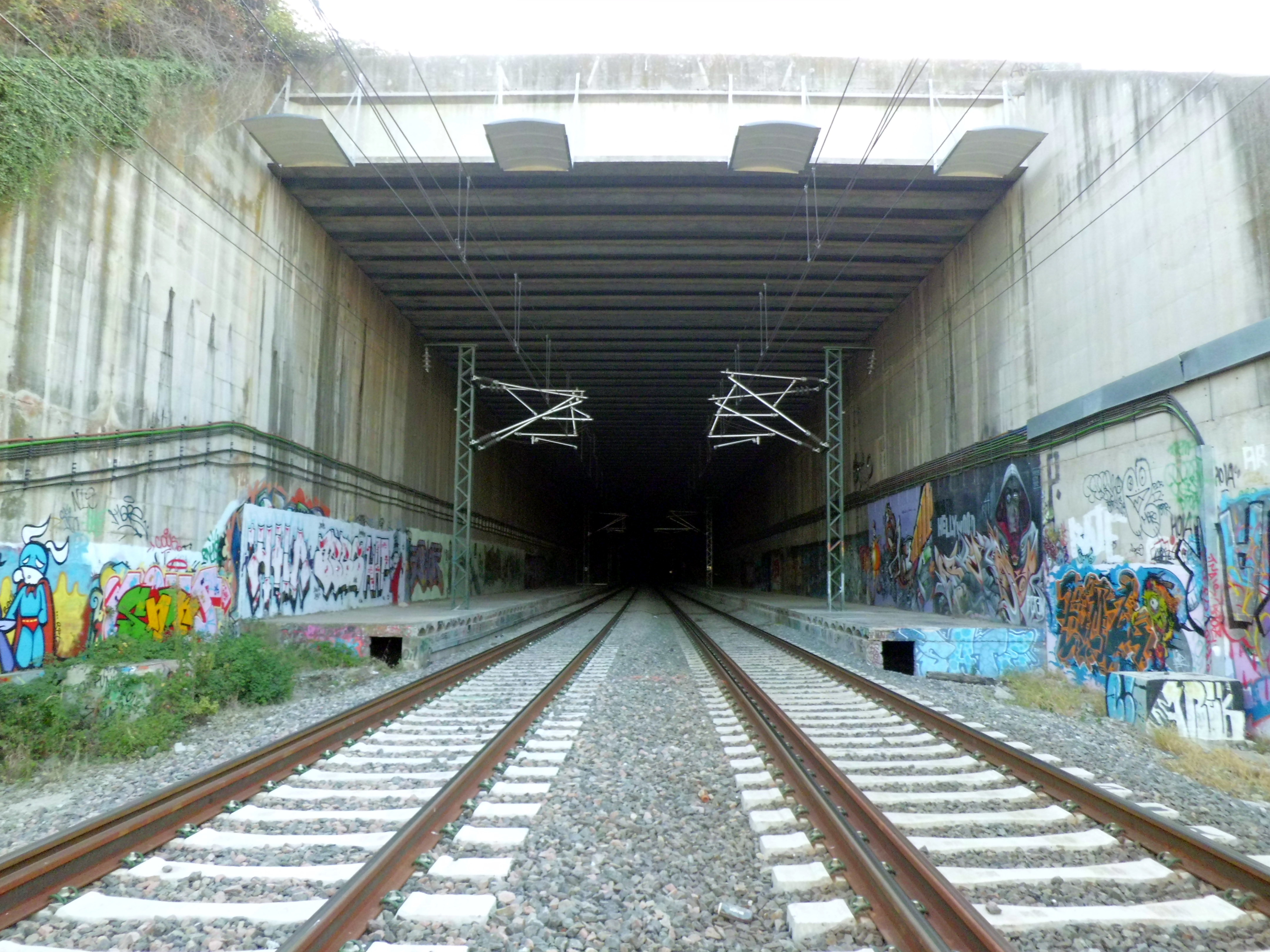 Baixador en desús de la línia (operativa) R7 a l'altura de Barberà del Vallès. Està ubicada en un túnel subterrani sota el complex comercial Baricentro.